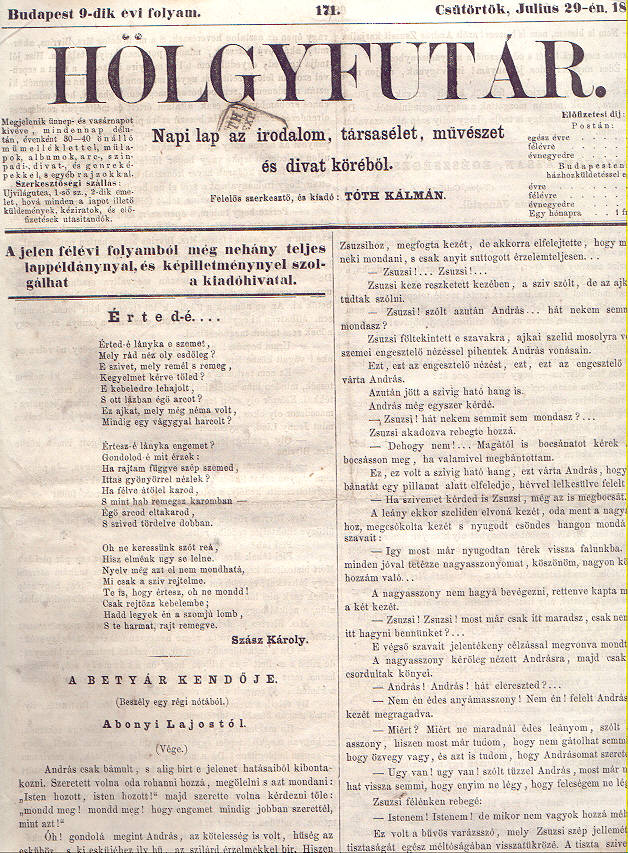 Hölgyfutár. Napi lap az irodalom, társasélet, művészet és divat köréből 1858.